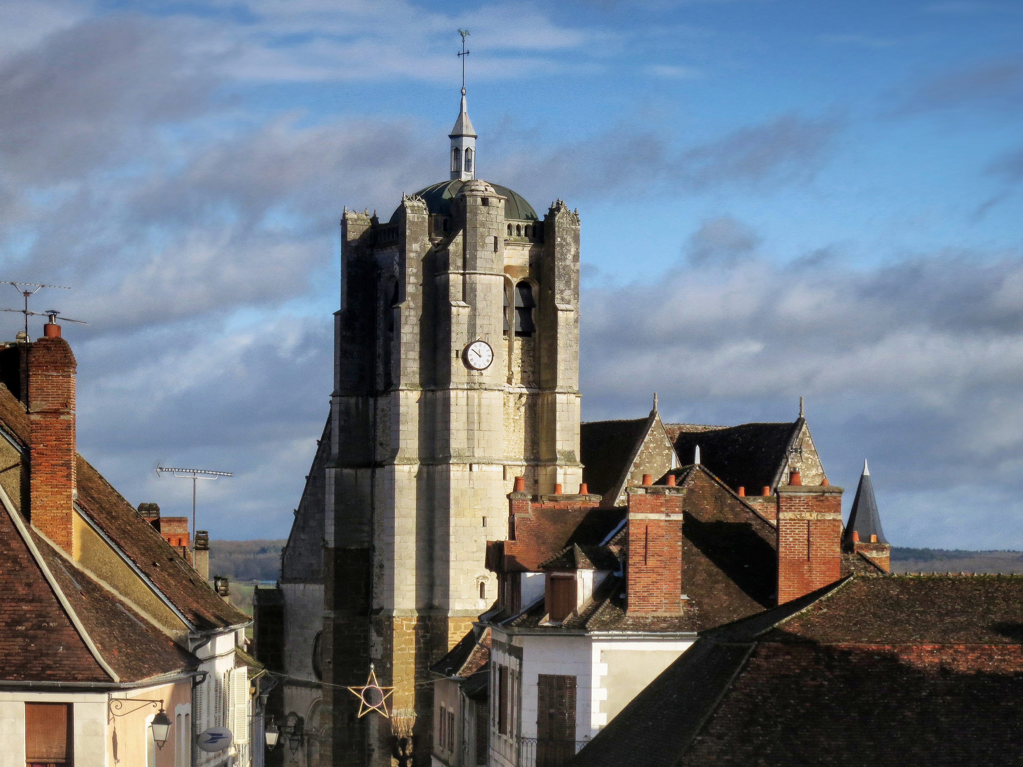 Seignelay (Yonne)